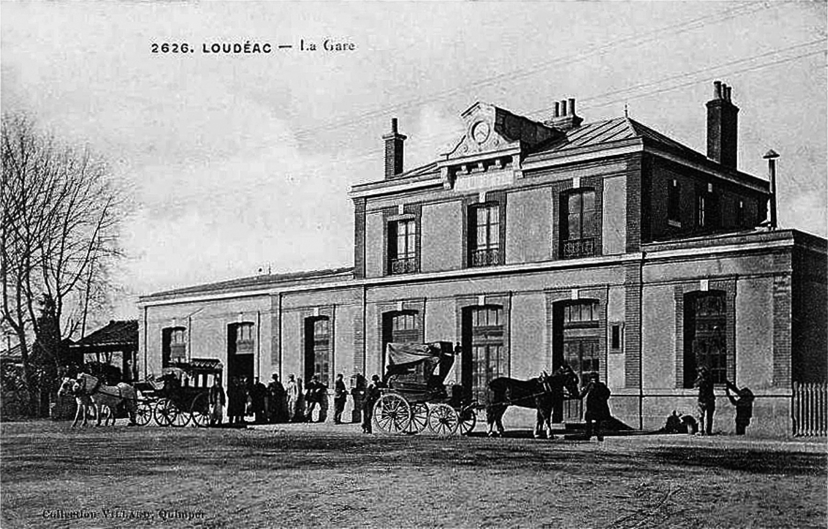 Gare de Loudéac, bâtiment voyageurs et la cours de la gare vers 1900.